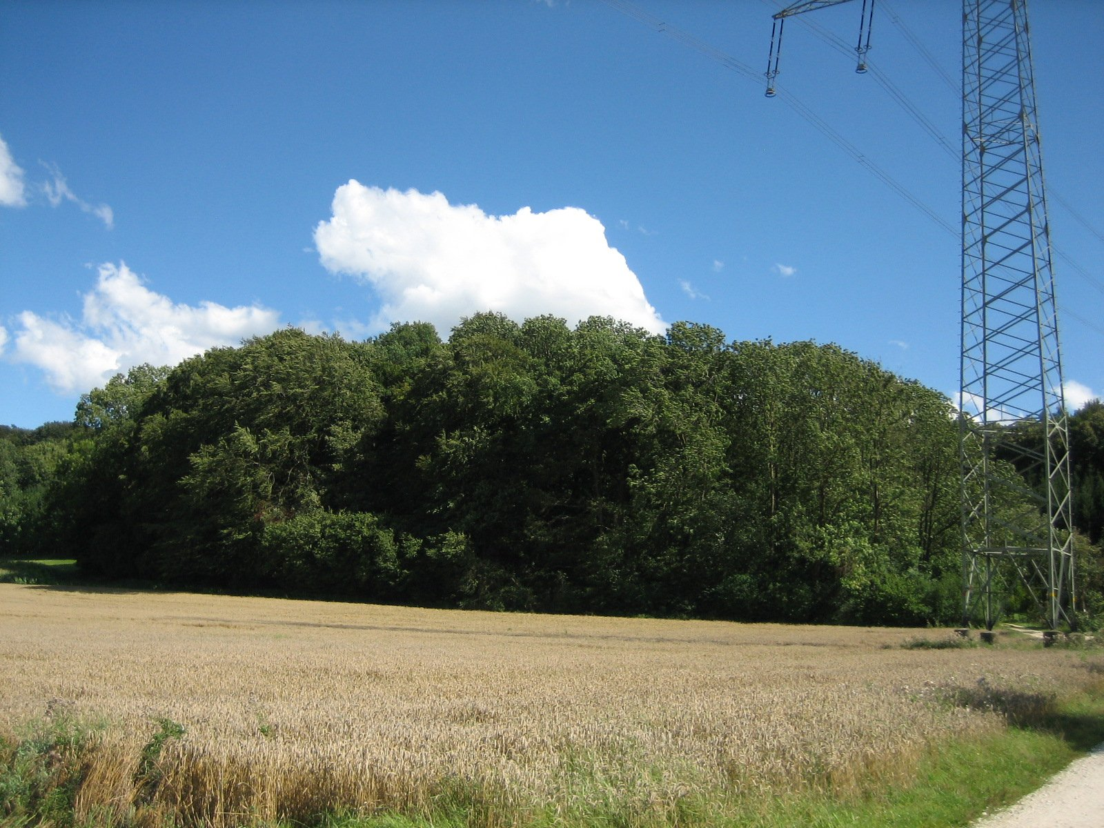 Gelände des "Bürgle" in Gundremmingen, aus ungefähr nordwestlicher Richtung fotografiert, in der Gegenwart mit Buschwerk und Bäumen bestanden